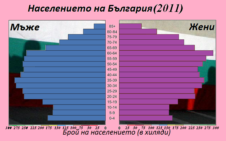 Таблица ,показваща броя на българите през 2011 година.